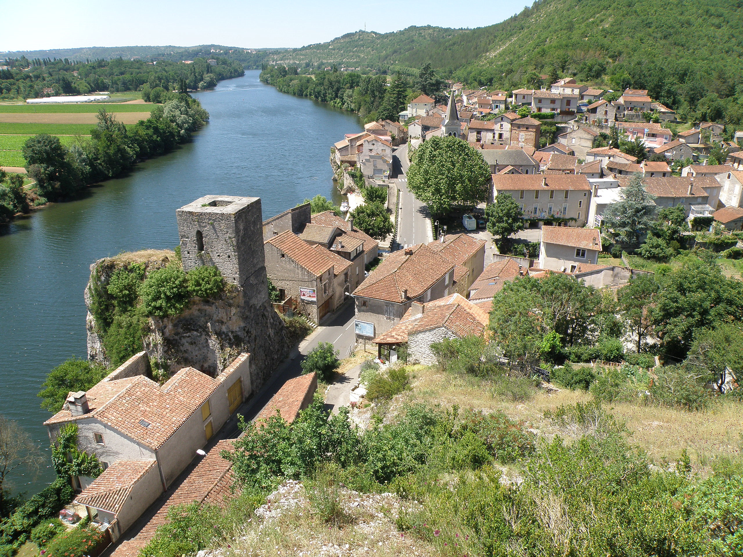 Laroque-des-Arcs, commune du Lot, France (région Midi-Pyrénées). Vue générale du bourg depuis la chapelle Saint-Roch. À gauche sur la photo : la rivière Lot, avec la masse grise et carrée de la tour de péage (XIIIe siècle). Nous regardons vers l'ouest-sud-ouest.